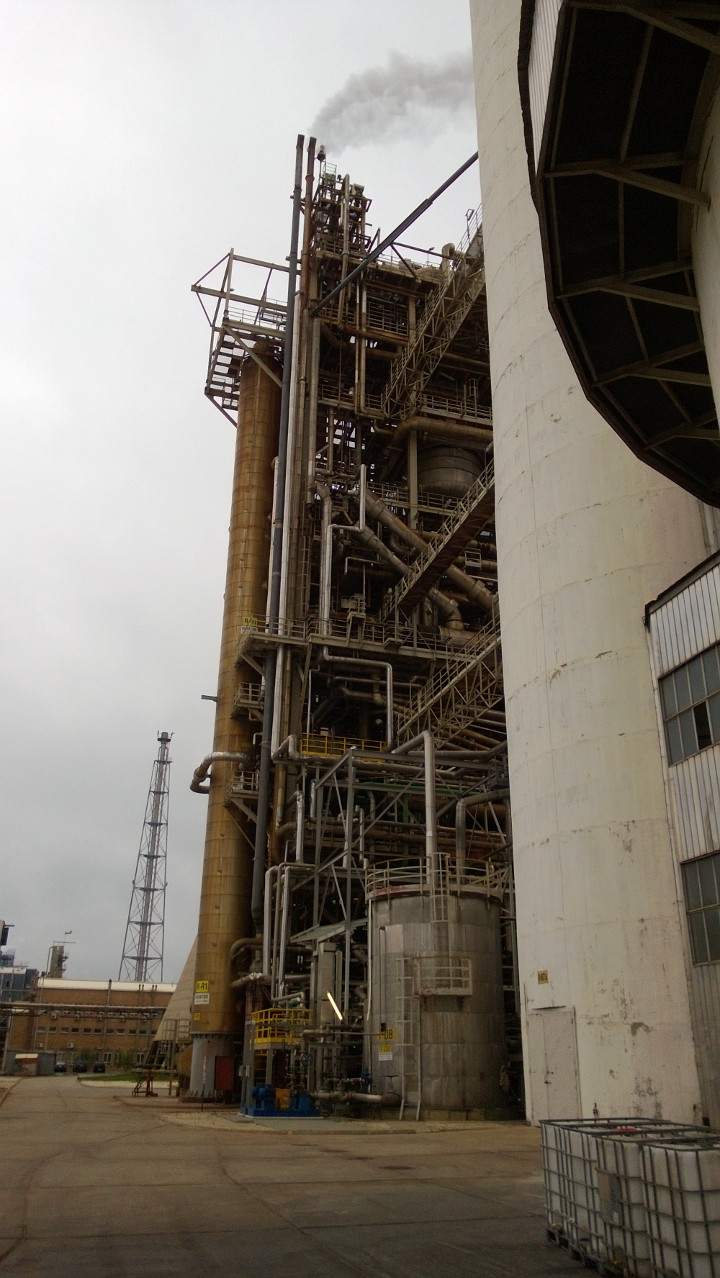 Instalacje produkcyjne w Grupie Azoty Zakładach Azotowych "Puławy" S.A.